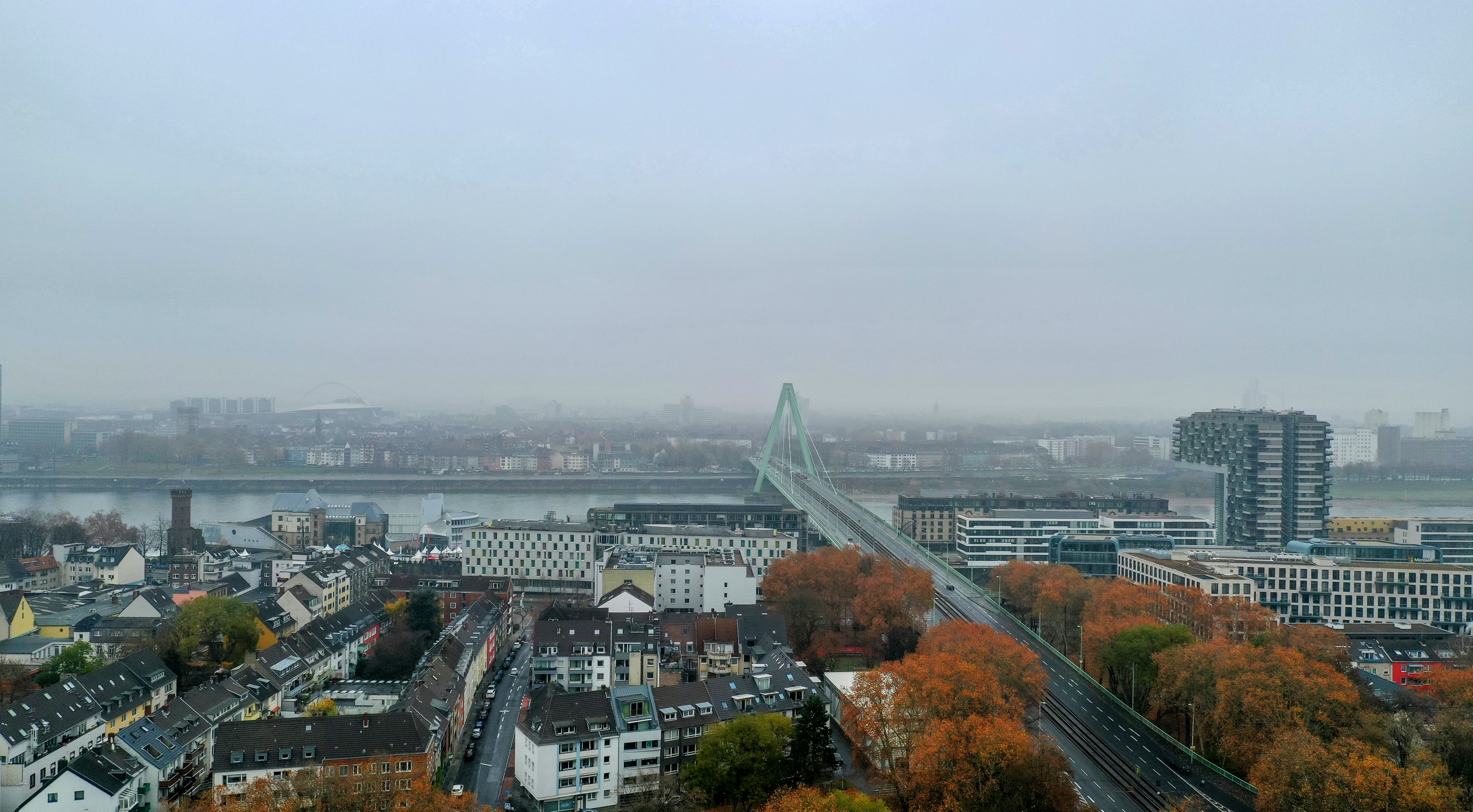 Die Severinsbrücke in der Kölner Südstadt, an einem Sonntag Mittag im Herbsnebel, aufgenommen aus 50 Metern Höhe.